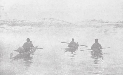 Photographie de l'explorateur Alfred de Quervain accompagné de deŭ Eskimos en kayak, lors d'une exploration entreprise en 1912. Ici dans le fjord de Sermilik.